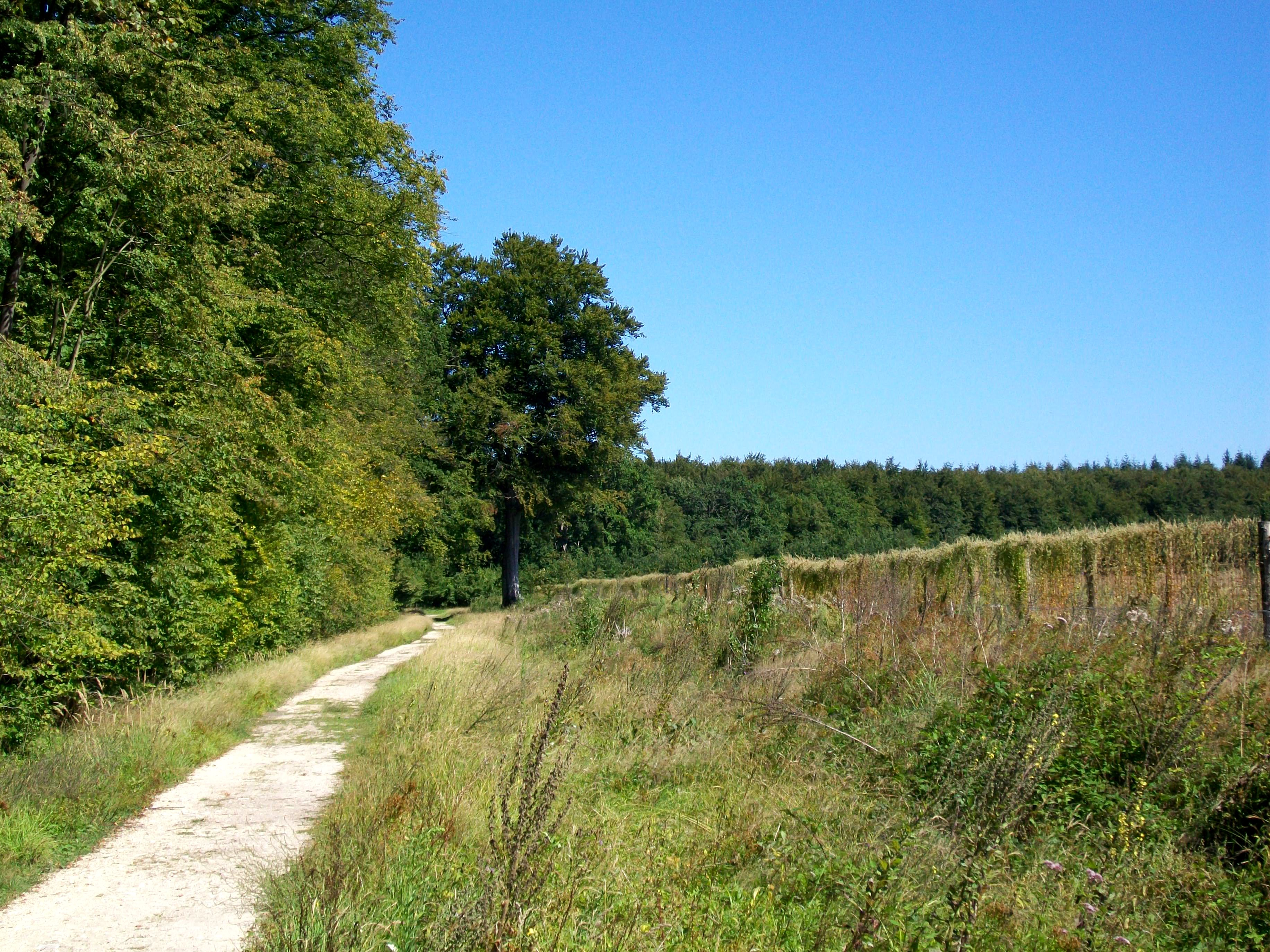 Le chemin des Vaches menant d'Avilly vers le poteau de l'Entonnoir dans la forêt de Chantilly.